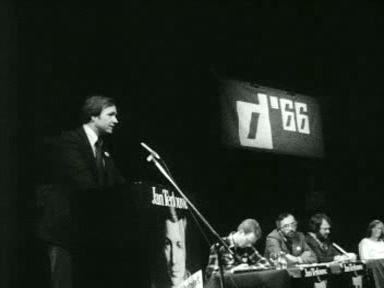 D'66-lijsttrekker Jan Terlouw in 1977.